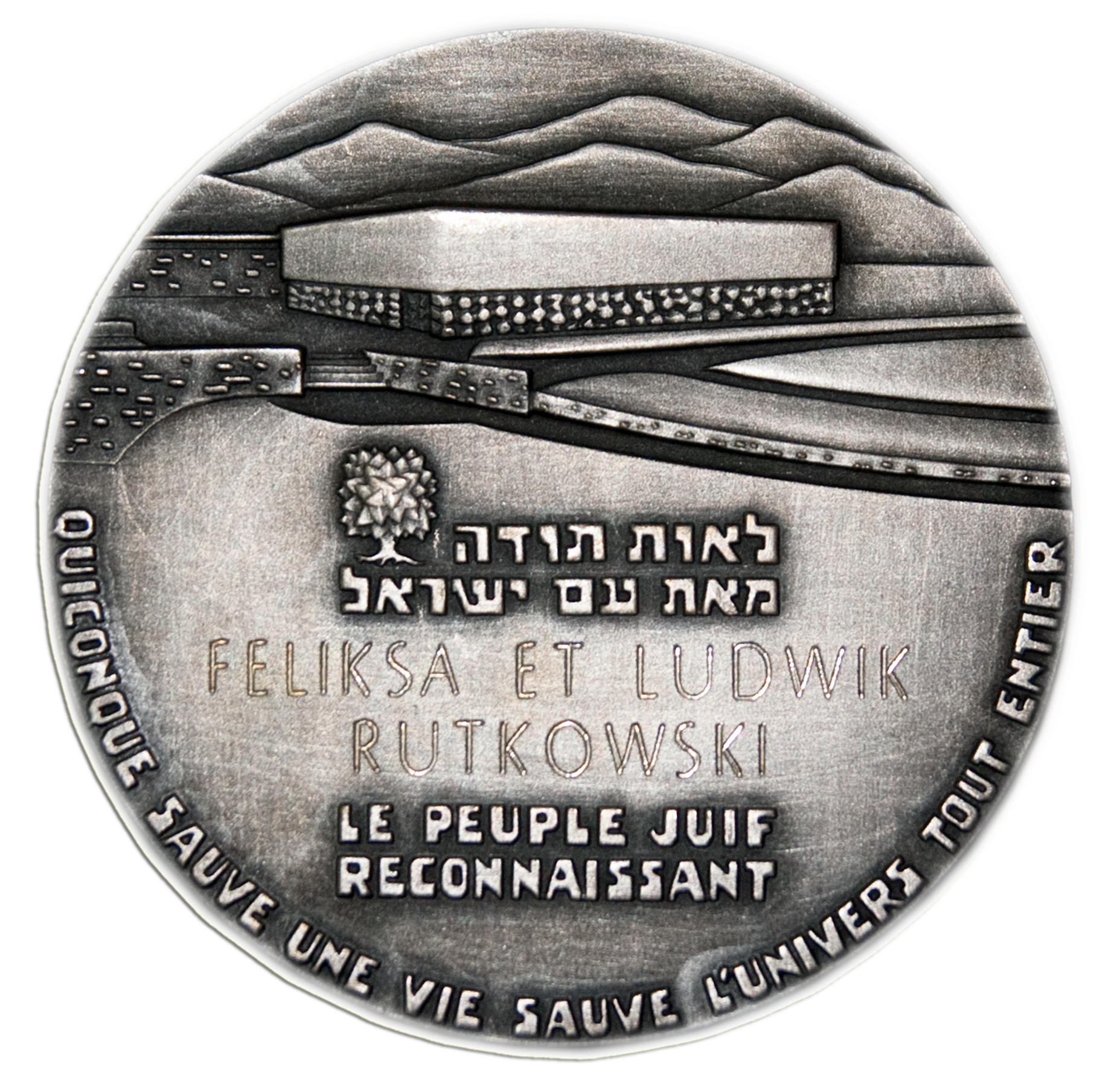 Medal Sprawiedliwy wśród Narodów Świata przyznany w 2008 małżonkom Feliksie i Ludwikowi Rutkowskim